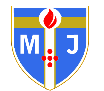 Herb biskupa Stefana Cichego, Legnica, Polska